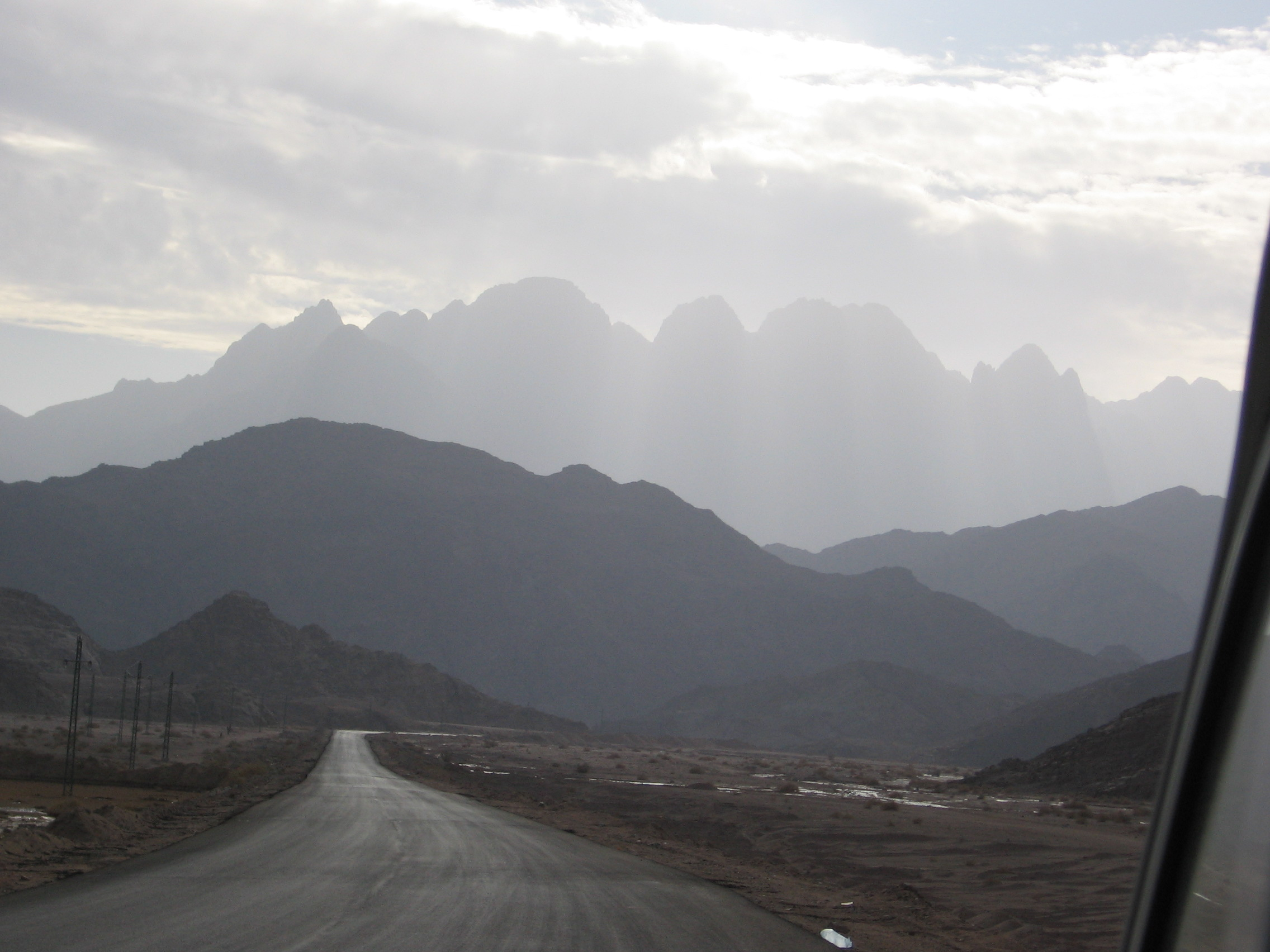 Ett av dom två bergen som man säger att mose hämtade sina 10 budord. (Inte det vid Katarina klostret)